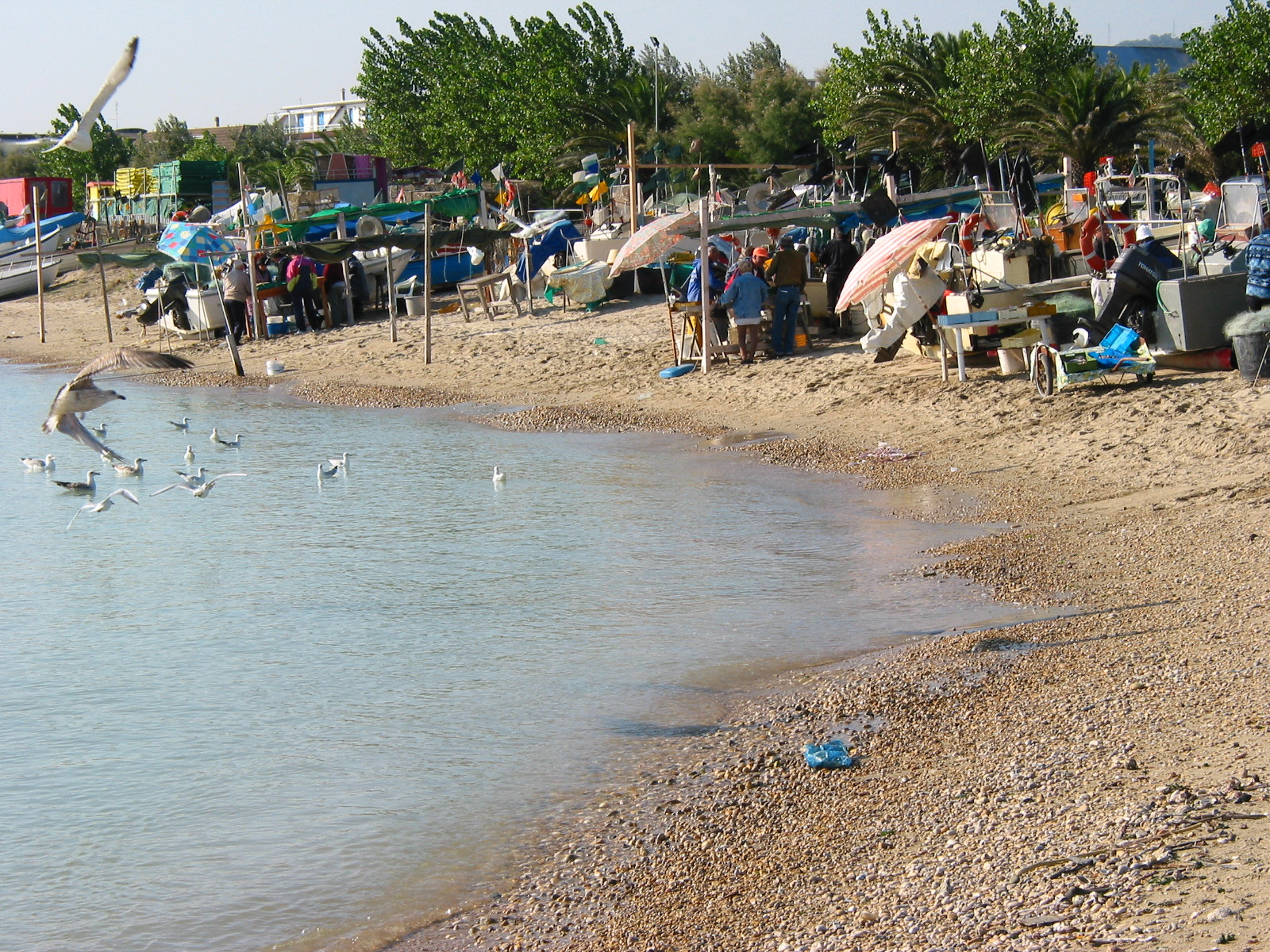 Martinsicuro, Abruzzo, ItaliaPorto di Martinsicuro , Abruzzo